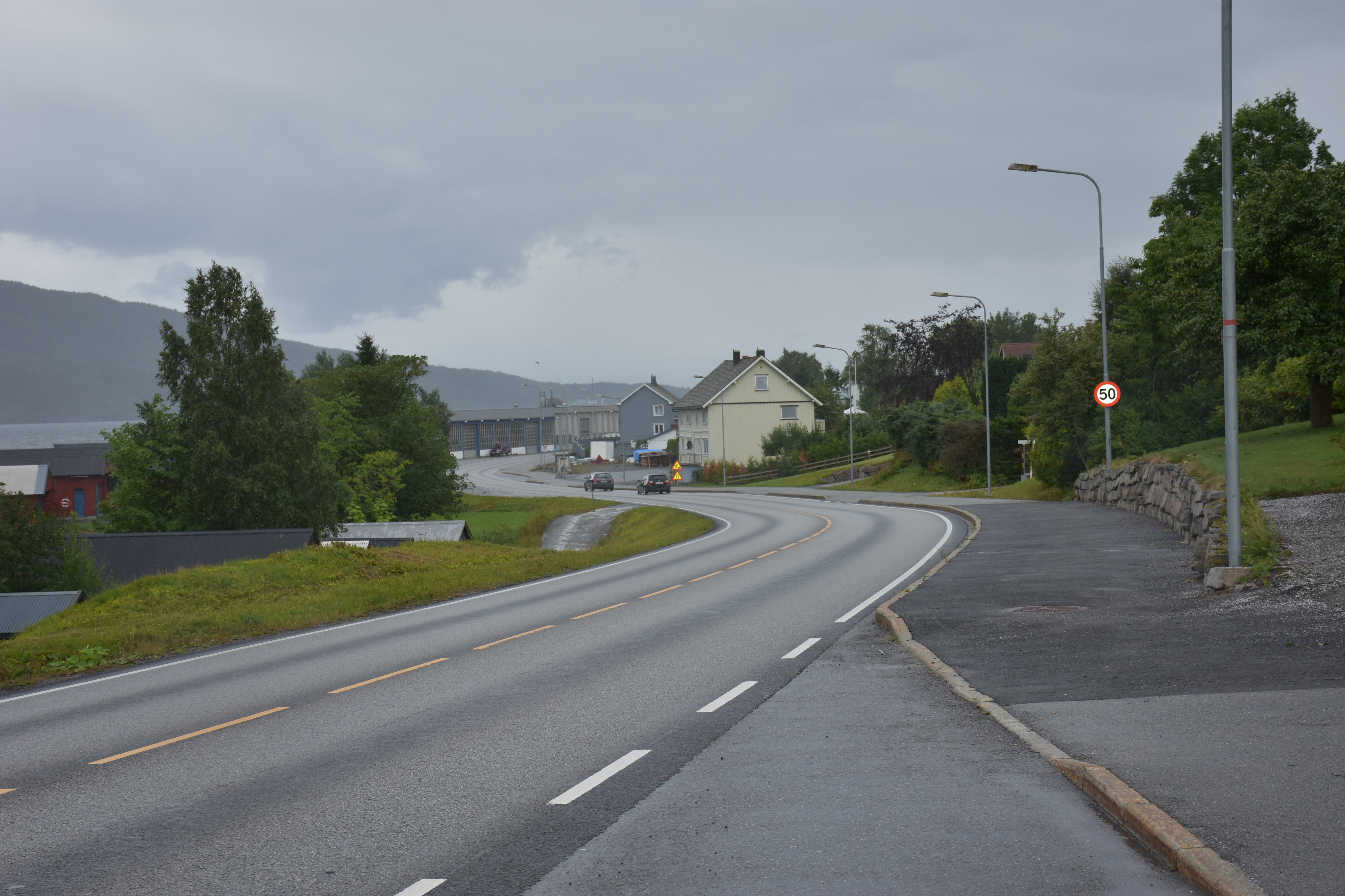 E39 gjennom Hjelset i Molde kommune